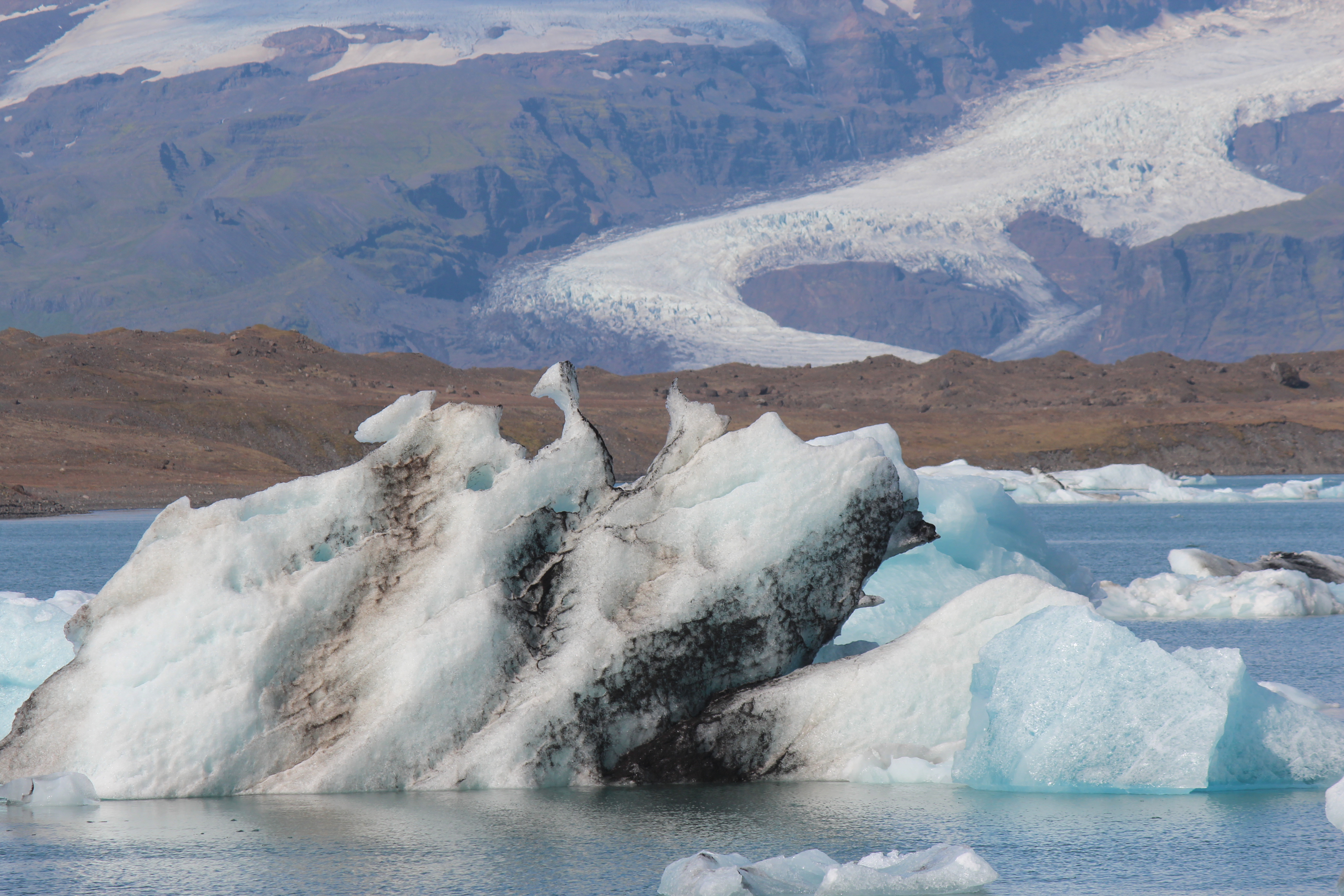 De Gletscherséi Jökulsárlón an Island.